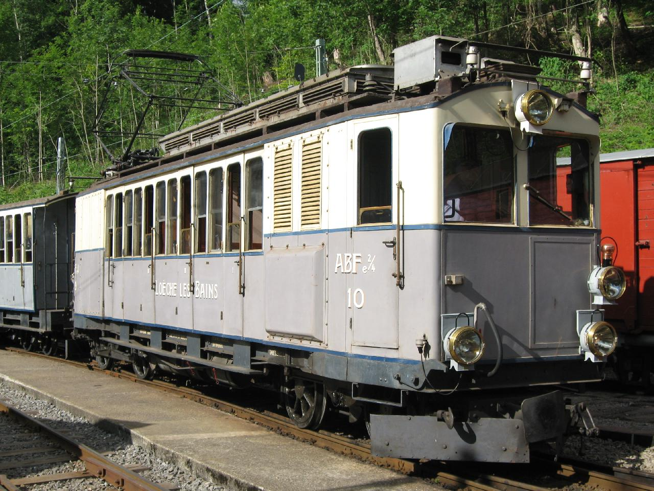 Historischer Motorwagen BCFeh 4/4 10 mit gemischtem Adhäsions- und Zahnradantrieb der ehemaligen Leuk–Leukerbad-Bahn (LLB), heute Verkehrsbetriebe Leuk–Leukerbad und Umgebung (LLB), bei der Museumsbahn Blonay–Chamby in Chamby-Musée (Chaulin), im Frühling 2011.